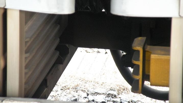 JR東日本E531系先頭車と次位車に取り付けられている緩衝機能付アンチクライマー